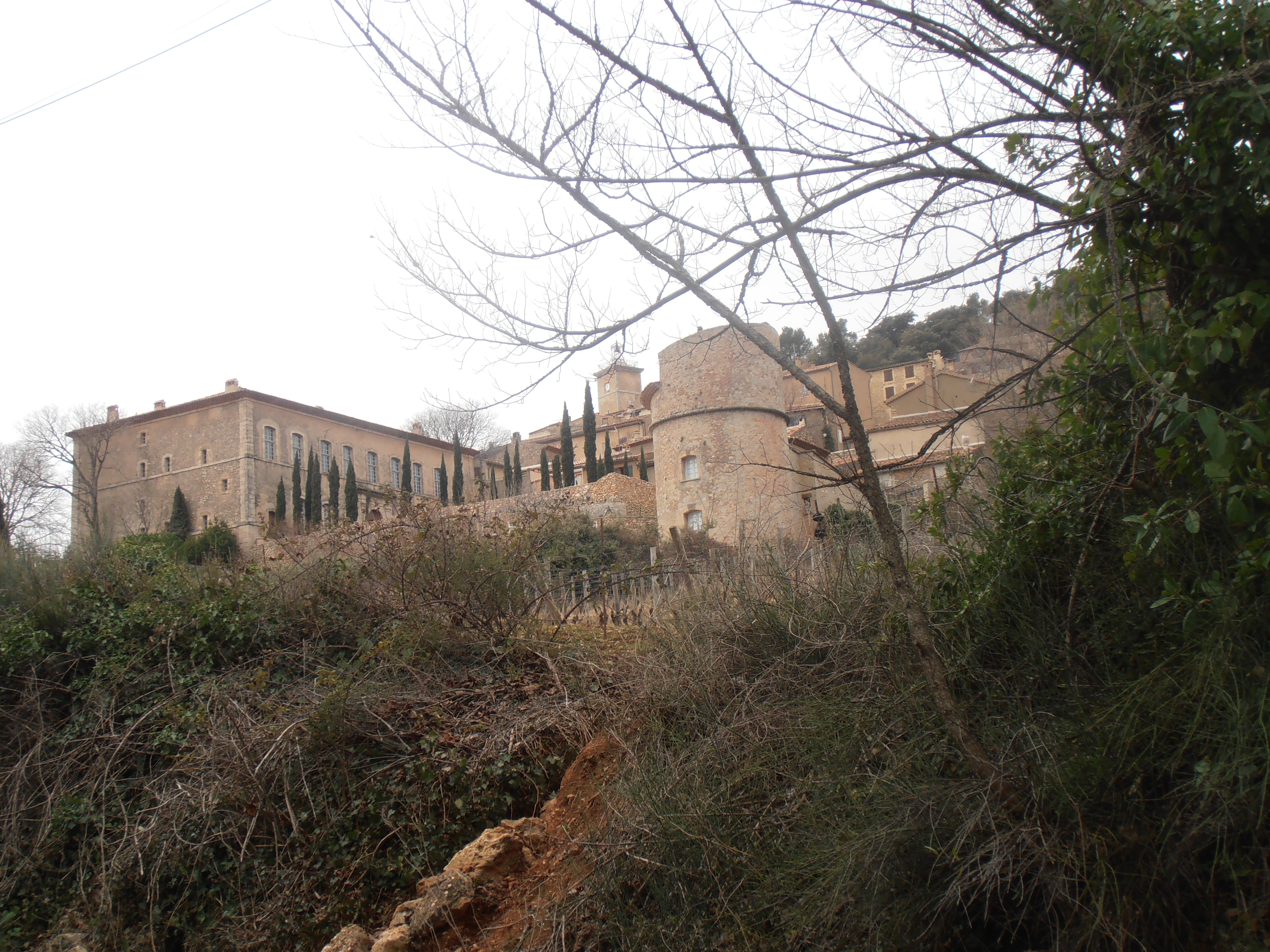 Var, Moissac-Bellevue, Château et pigeonnier. Le château de Moissac, lieu de villégiature de nobles familles provençales fin XVIe / début XVIIe, et son pigeonnier (tous deux privés) ont appartenu à différentes familles : le baron d’Hesmivy, puis Antoine Emerigon riche négociant de Marseille, mort en 1785, qui fut nommé contrôleur à la chancellerie près de la cour de Provence de Louis XVI. Laissé à l’abandon, les héritiers des propriétaires du château le revendirent à l’actuel propriétaire, qui a procédé à partir de 1992 à son sauvetage et à une réutilisation respectueuse de l'architecture. Il a également veillé à la préservation de l'environnement du site en intervenant sur les espaces agricoles dès qu'il a pris possession du château et des terres et dépendances.